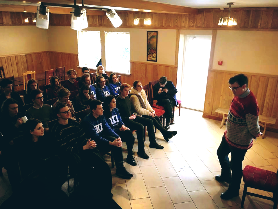 Kadras iš Jaunųjų konservatorių lygos organizuotų akademinių mokymų.